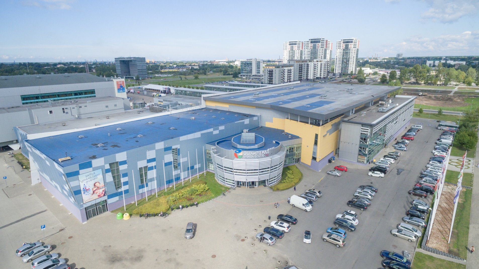 Elektrum olimpiskais centrs